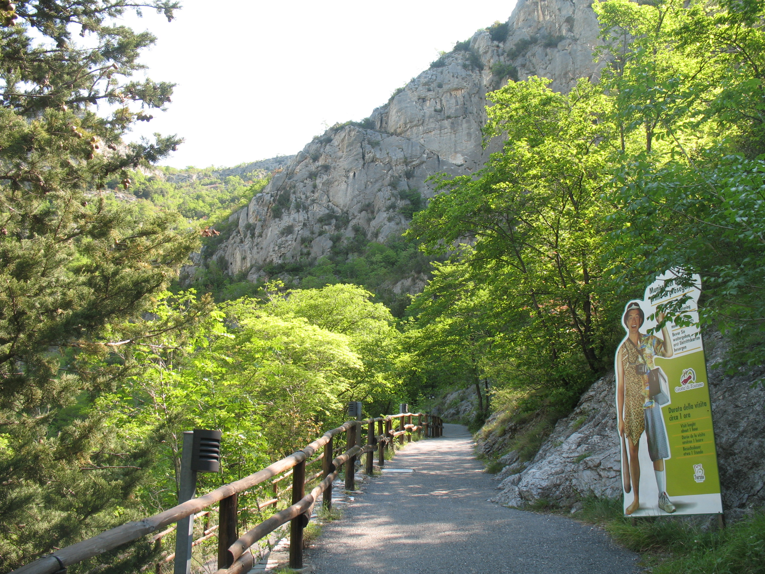 Grotte di Toirano, a Toirano, Savona, Liguria, Italia